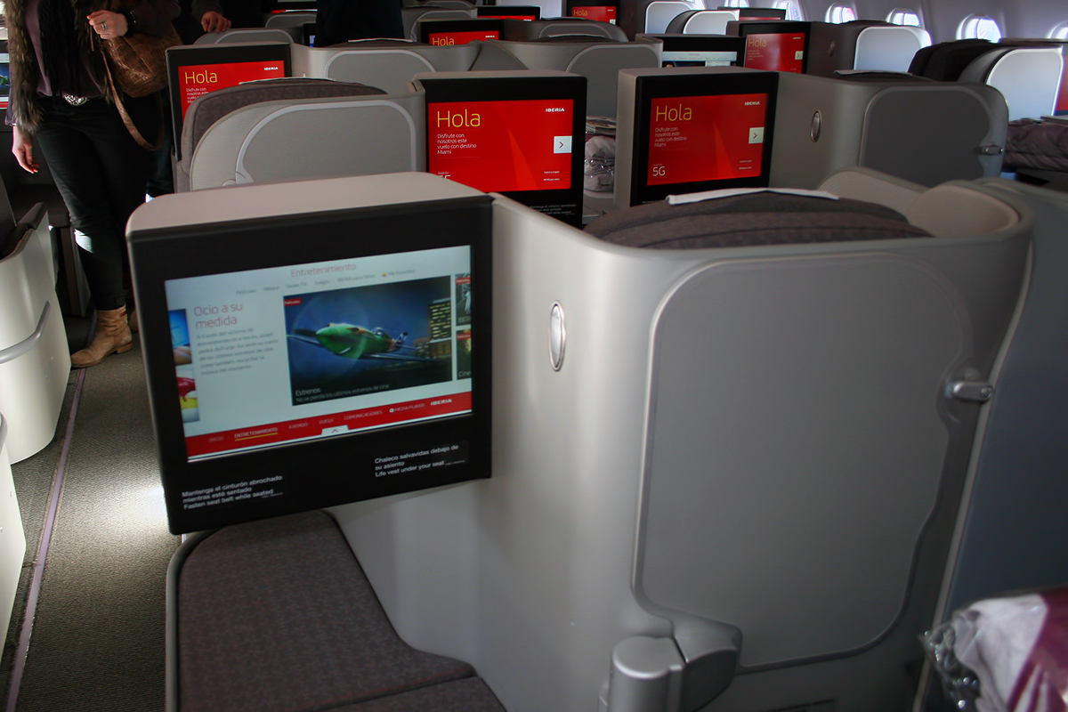 Madrid - Barajas Airport (LEMD/MAD)